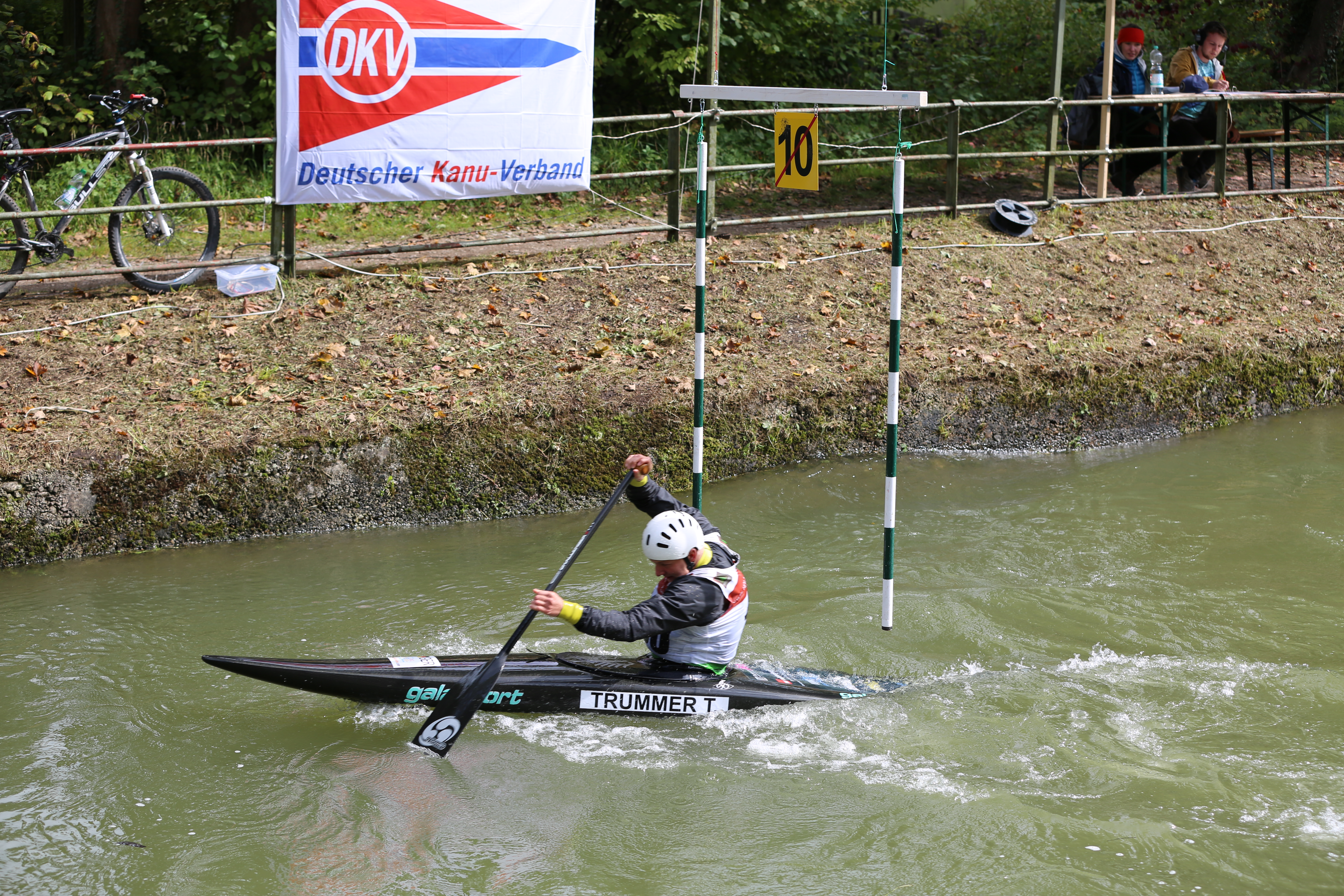 Deutsche Meisterschaft 2017 im Kanuslalom, München-Thalkirchen. Transparent des Deutschen Kanu-Verbands.